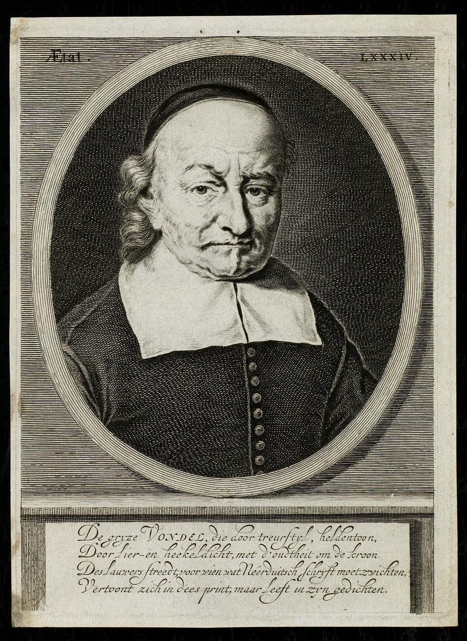 Gravure van Joost van den Vondel door Hendrik Bary